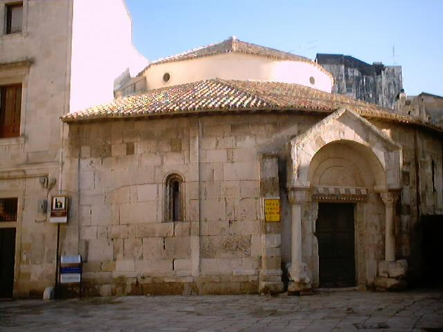 Questa foto l'ho scattata io un po' di tempo fa. Si tratta di San Giovanni al Sepolcro della città di Brindisi, in Puglia. Forse non è chiarissima perché la macchina fotografica digitale che ho usato non era proprio tra le migliori, ma ho comunque pensato di mandarvela perché ho notato che della mia città avete poche foto e mi piacerebbe contribuire ad arricchire questa voce. Pertanto vi lascio liberi di scegliere se ed in che modo sfruttare questo file.